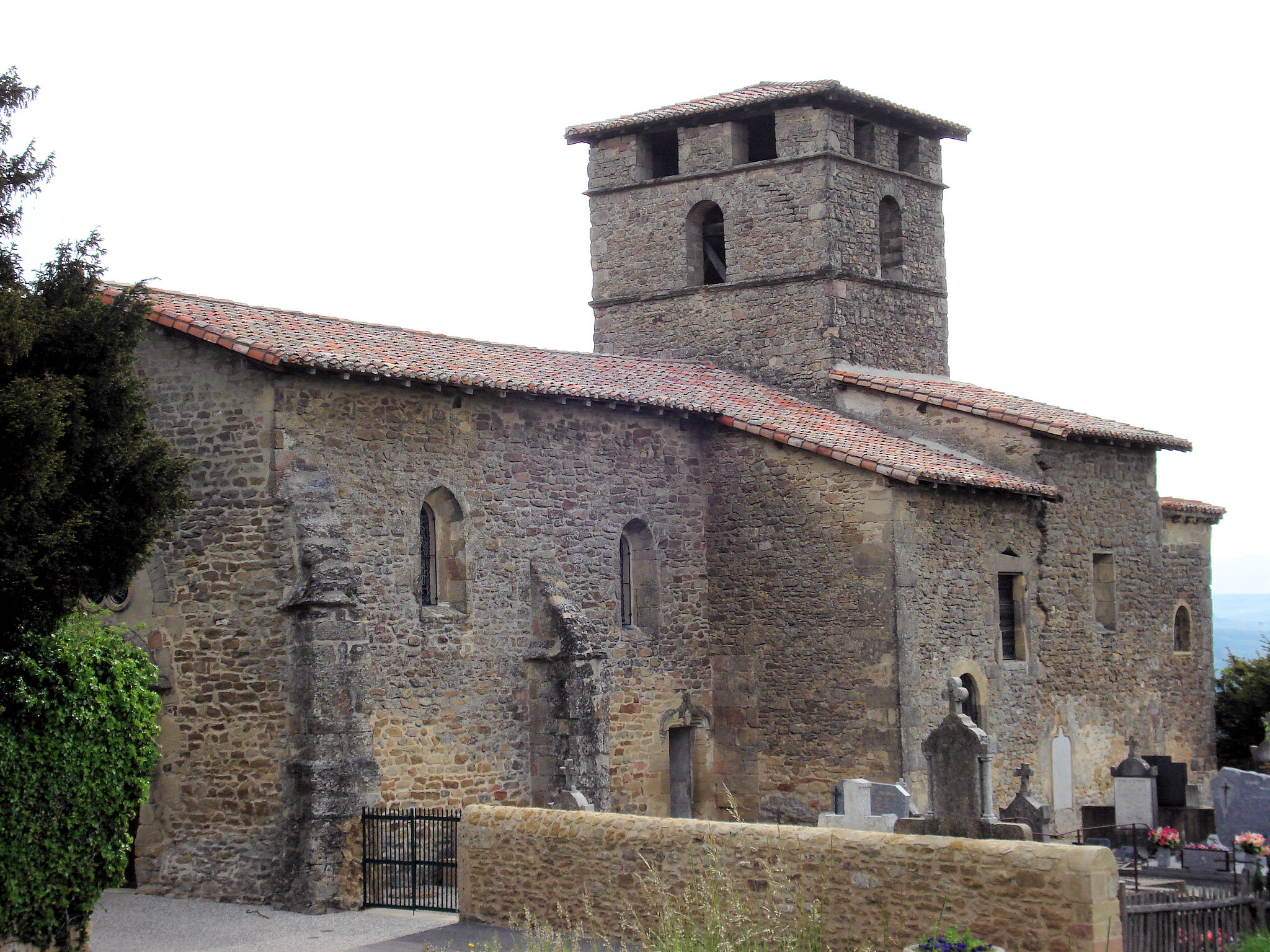 église des IXème et XIème siècle de Bathernay dans la Drôme